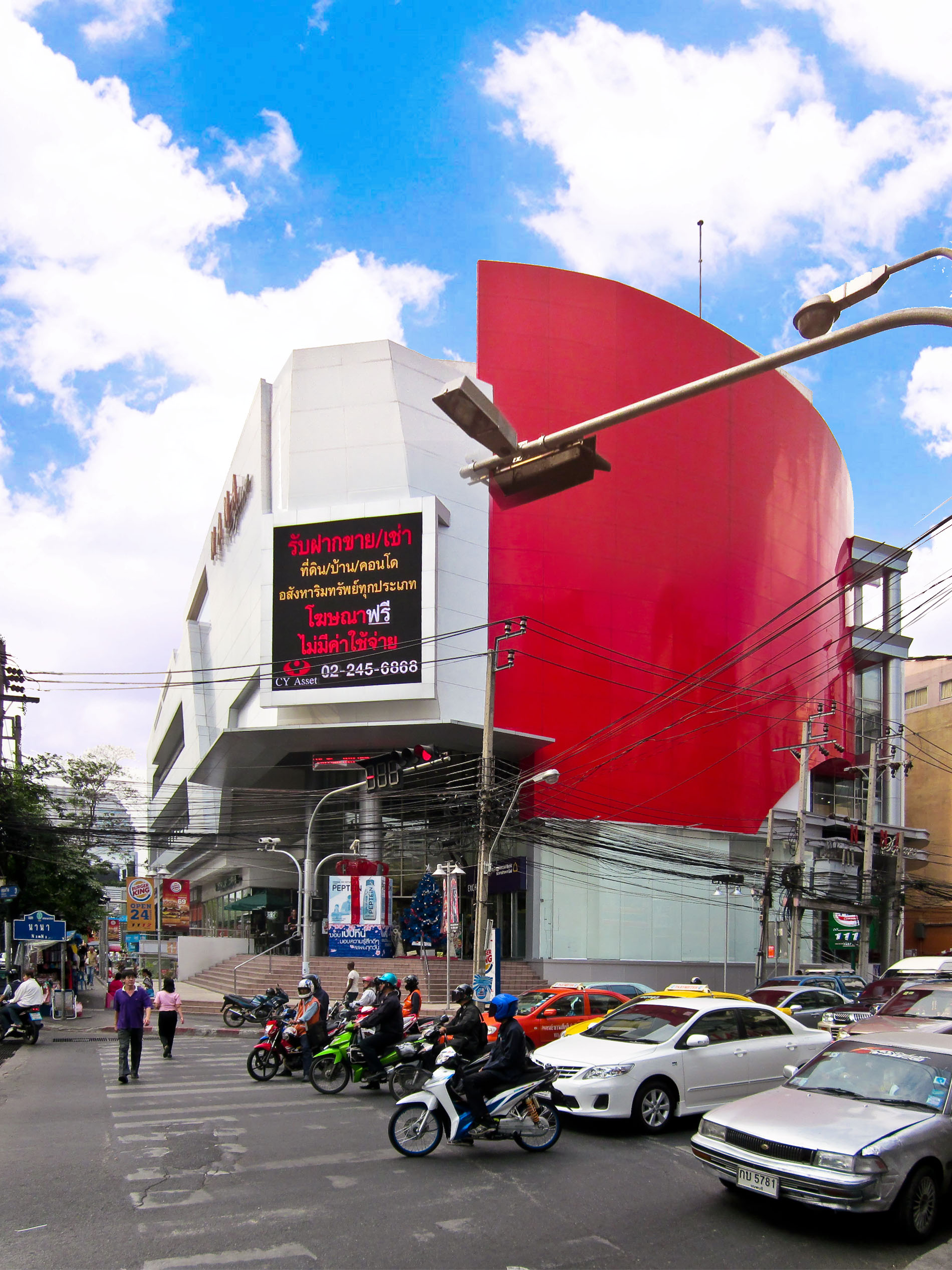 Nana